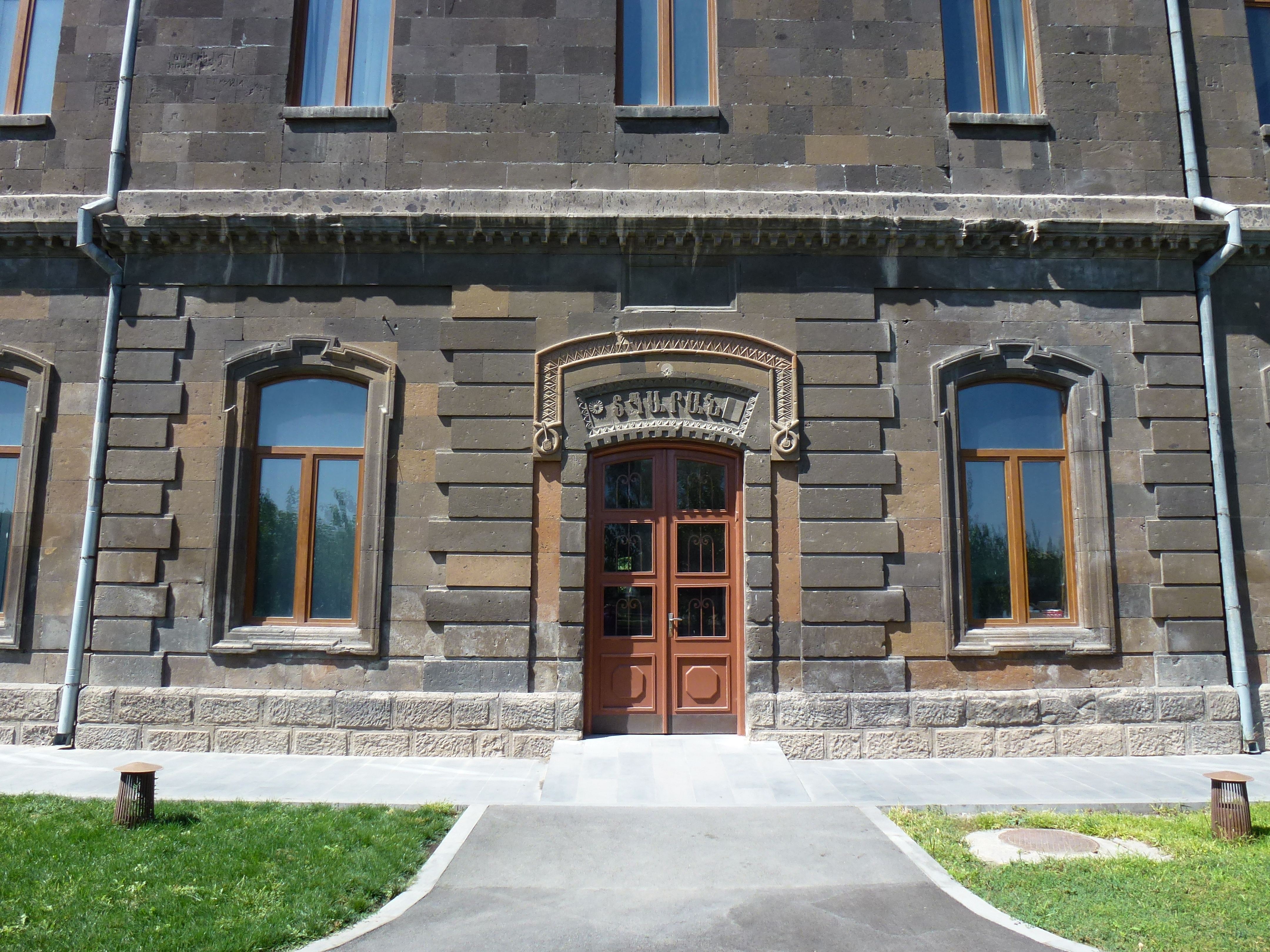 Տպարանի շենք Էջմիածնում 2/14.8